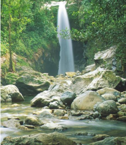 esta foto es del rio Aguan